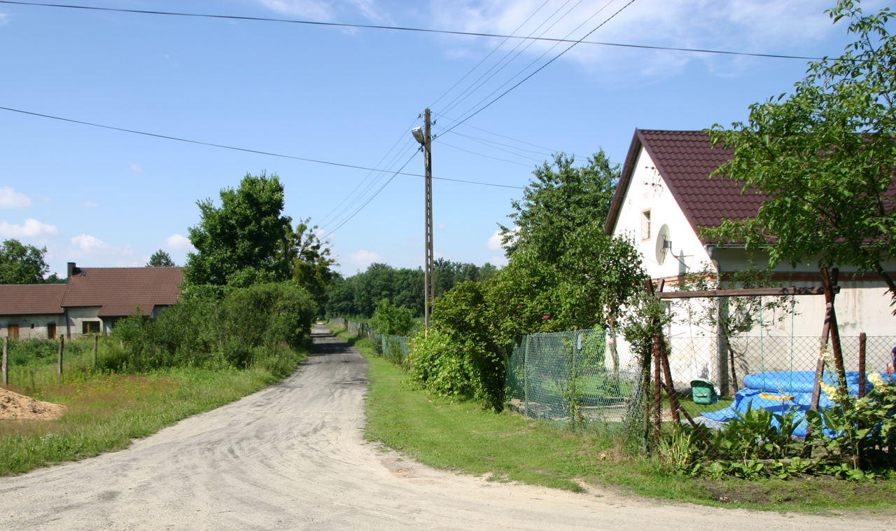 Kopalina (dodatkowa nazwa w j. niem. Kopaline) – osada śródleśna w Polsce położona w województwie opolskim, w powiecie krapkowickim, w gminie Strzeleczki.